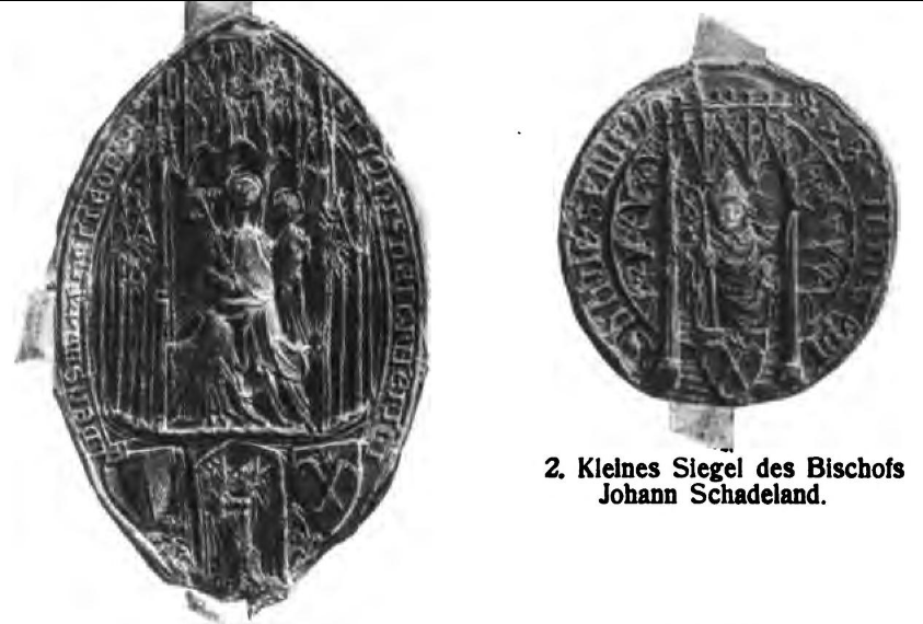 Siegel des Hildesheimer Bischofs Johannes Schadeland OP